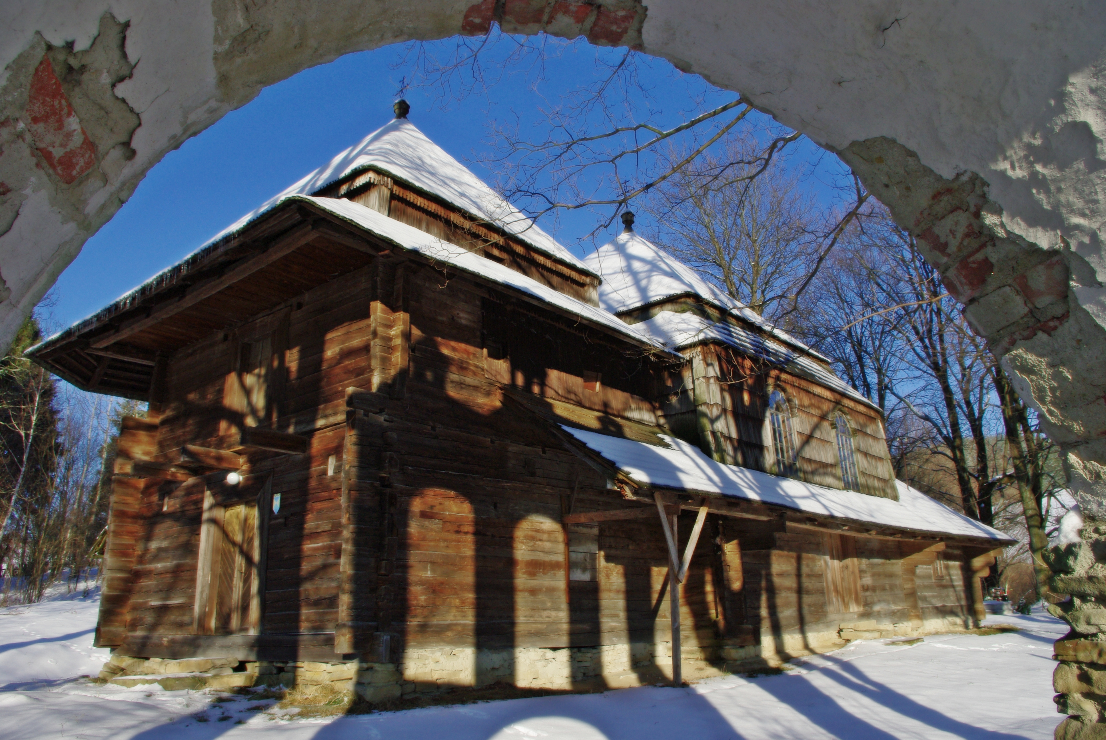 Liskowate cerkiew pw Narodzenia Marii Panny - widok spod dzwonnicy